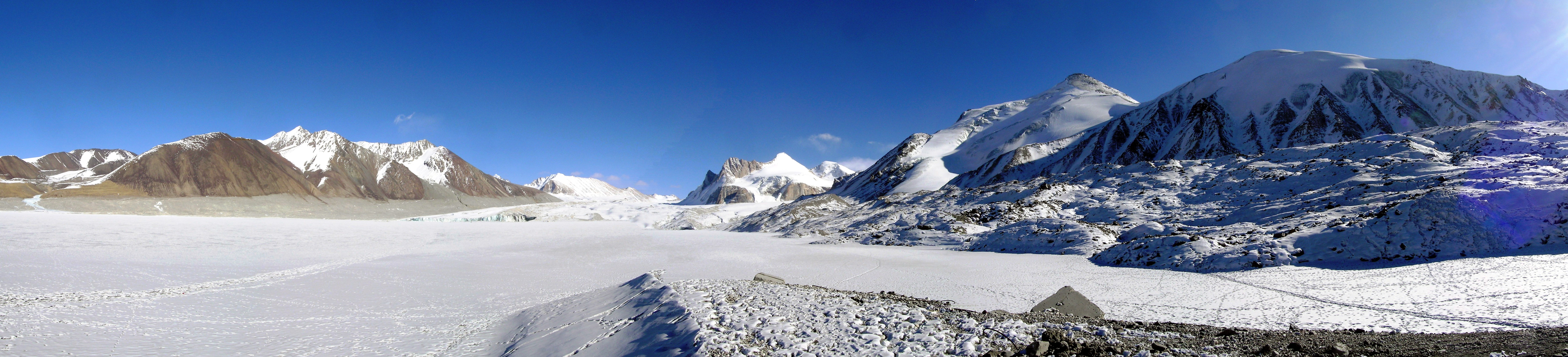 Petrov Lake